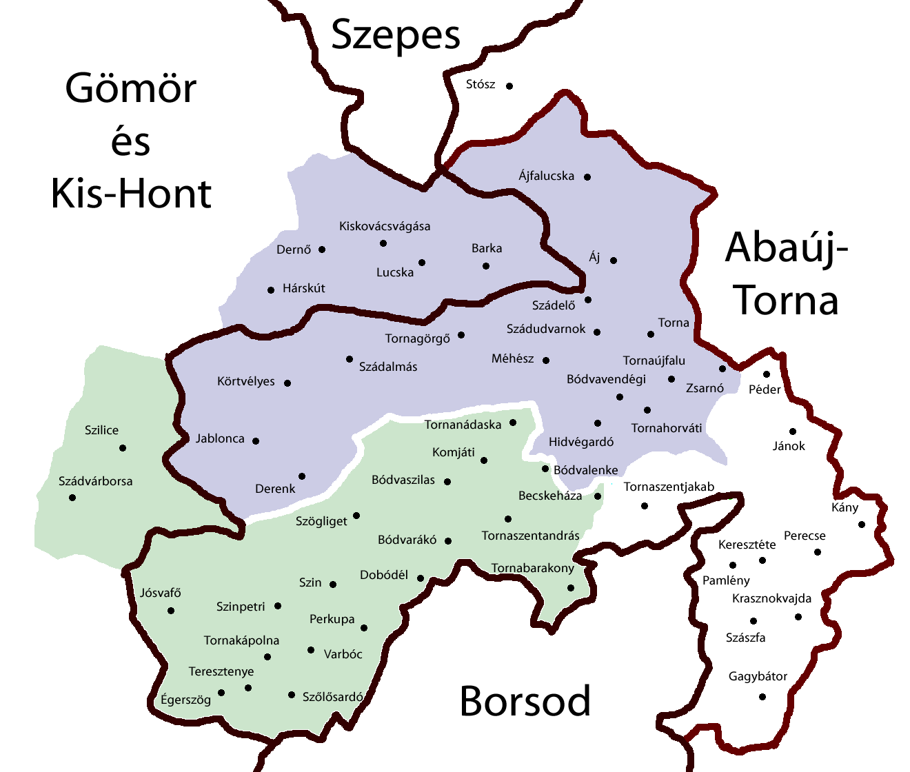 A Tornai járás 1914-ben és az egykori Torna vármegye